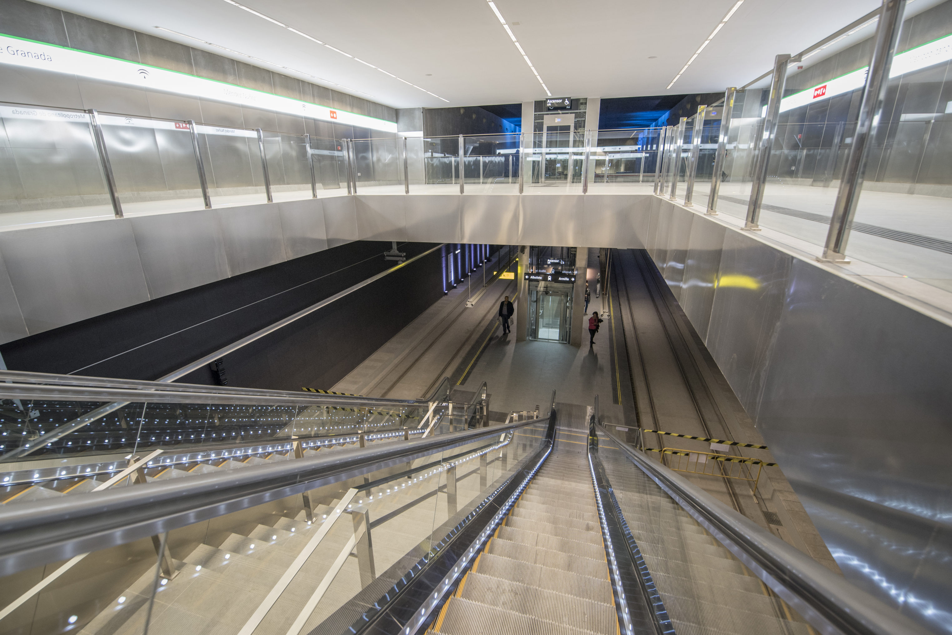 Estación de Méndez Núñez